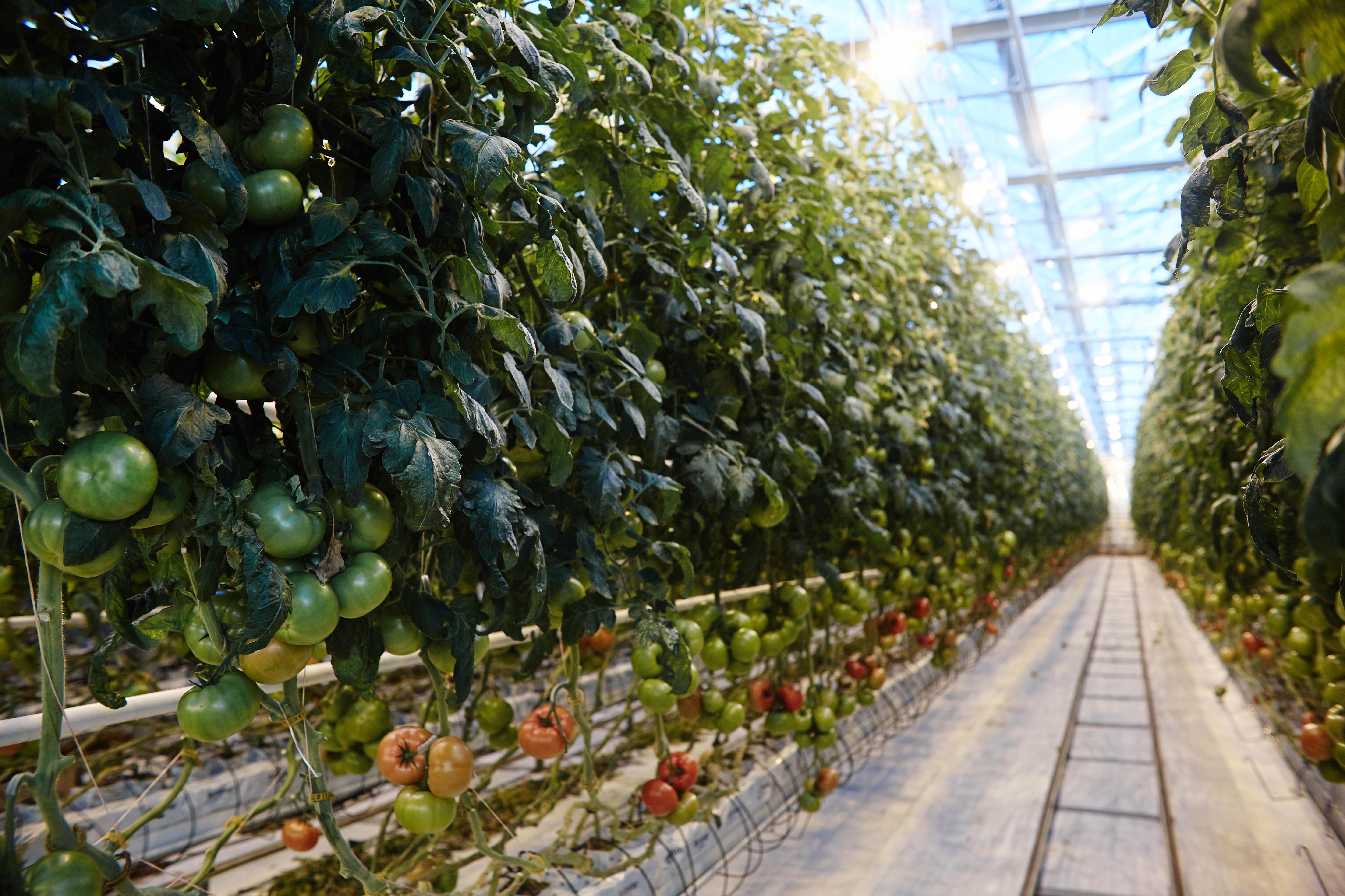 Теплицы Агрокомплекса "Чурилово"